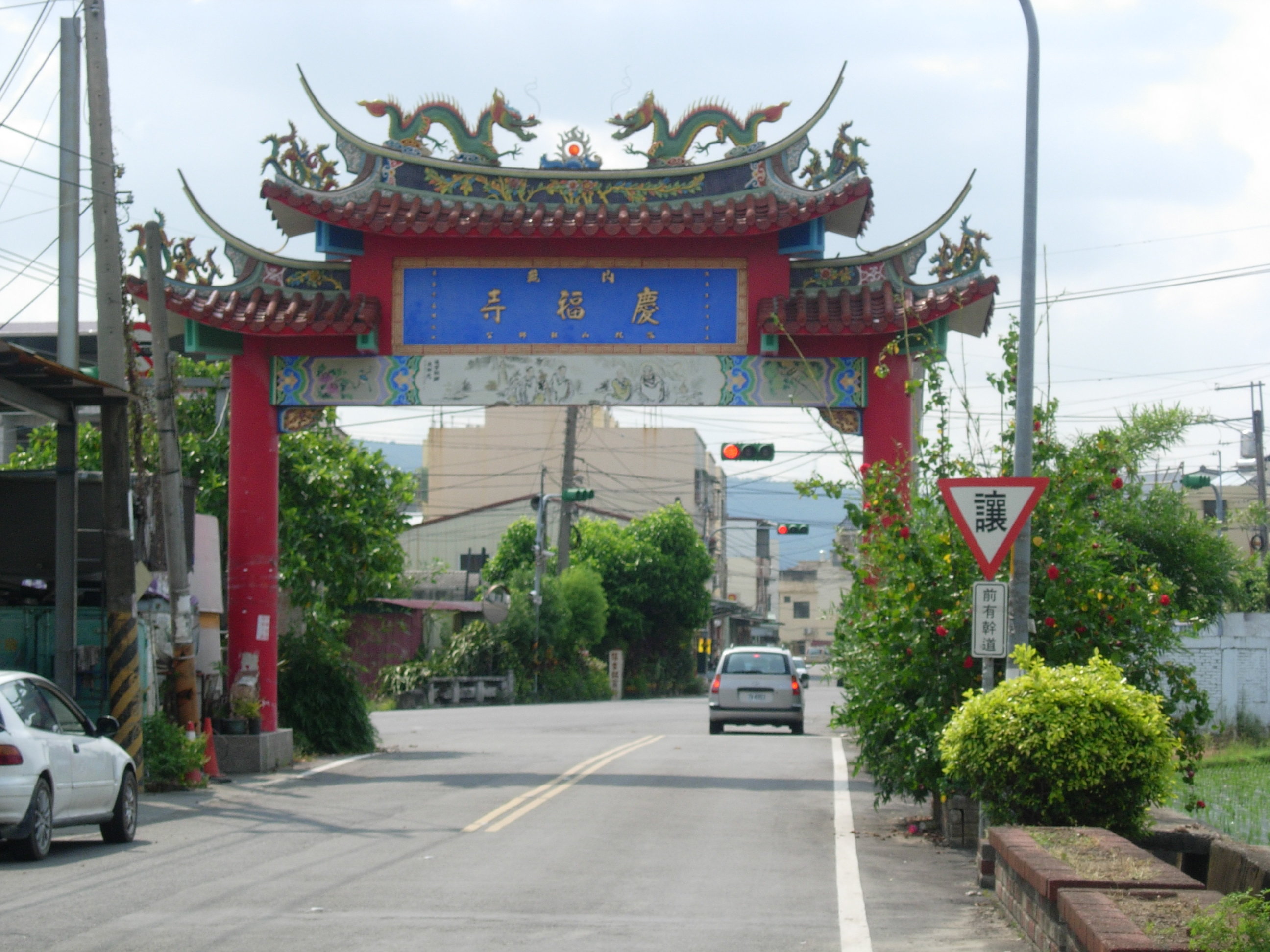 中文（台灣）: 內轆入口牌樓